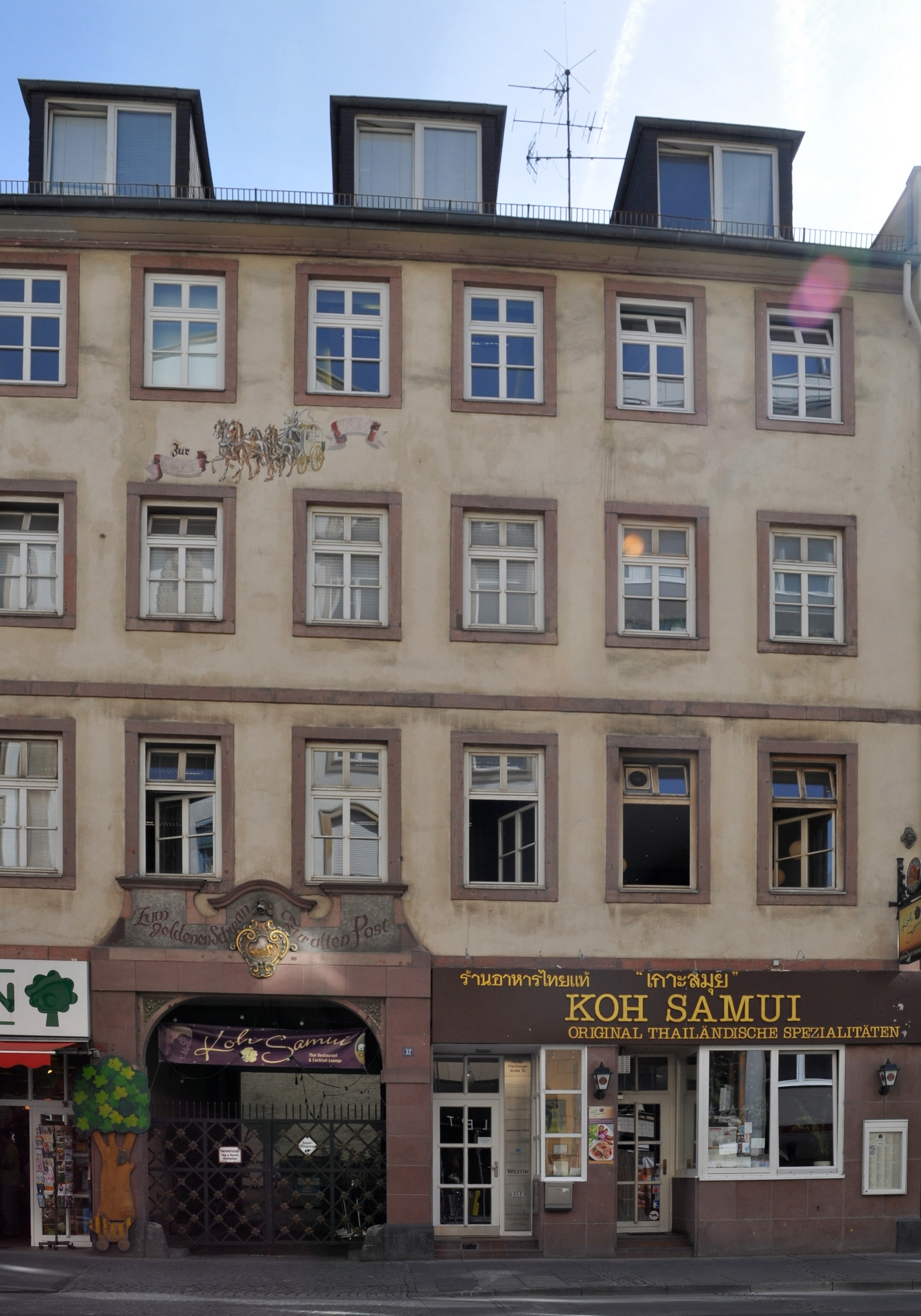 Große Friedberger Straße 32 in Frankfurt am Main (rechter Teil des Gebäudes)